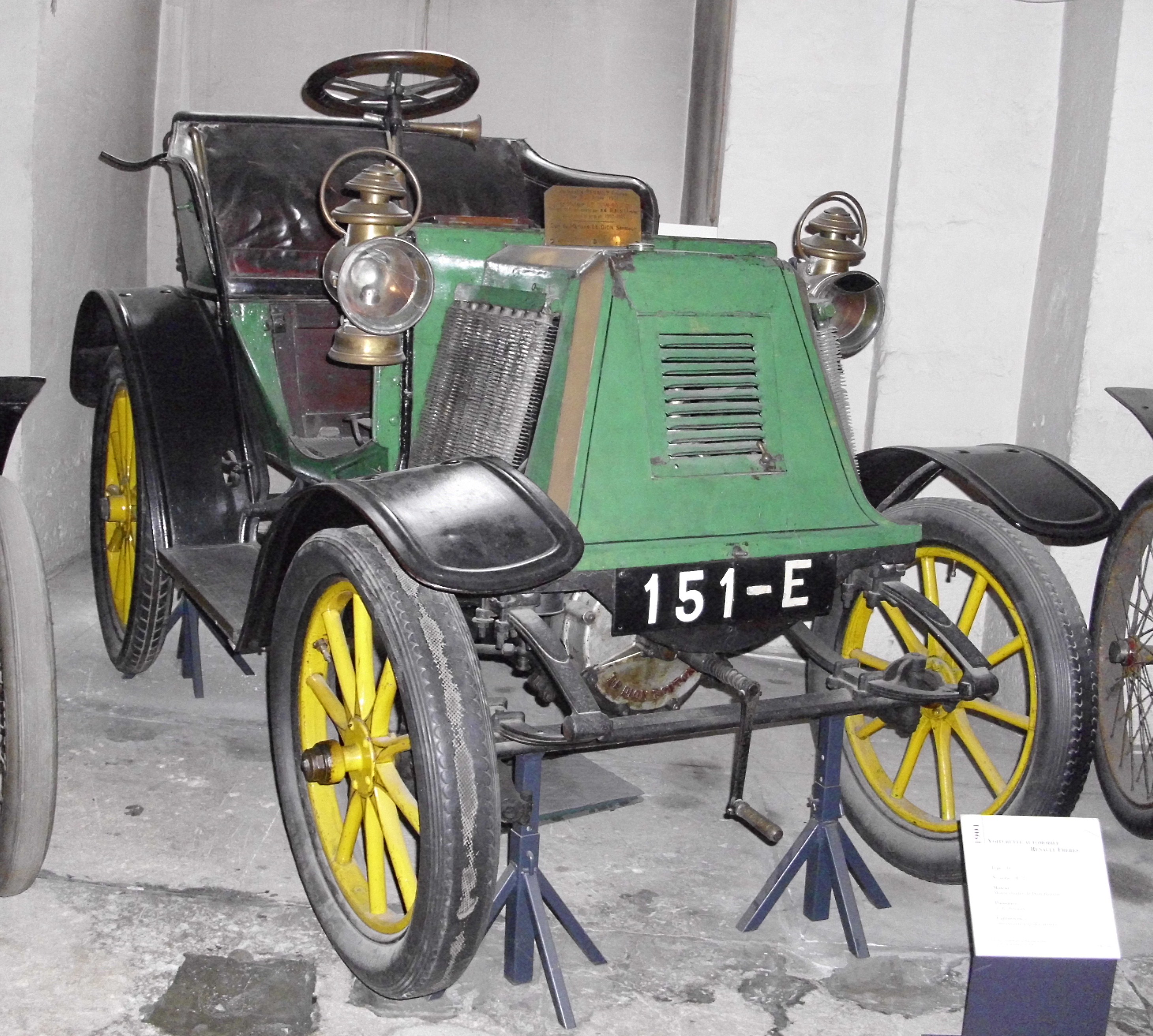 Renault Type D 1901